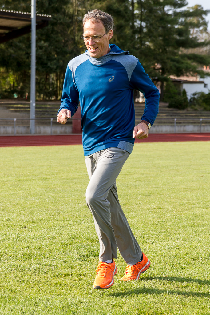 Dieter Baumann am 28. April 2017 in Pfungstadt